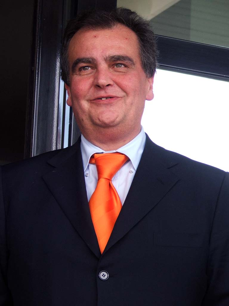 Il senatore italiano Roberto Calderoli.